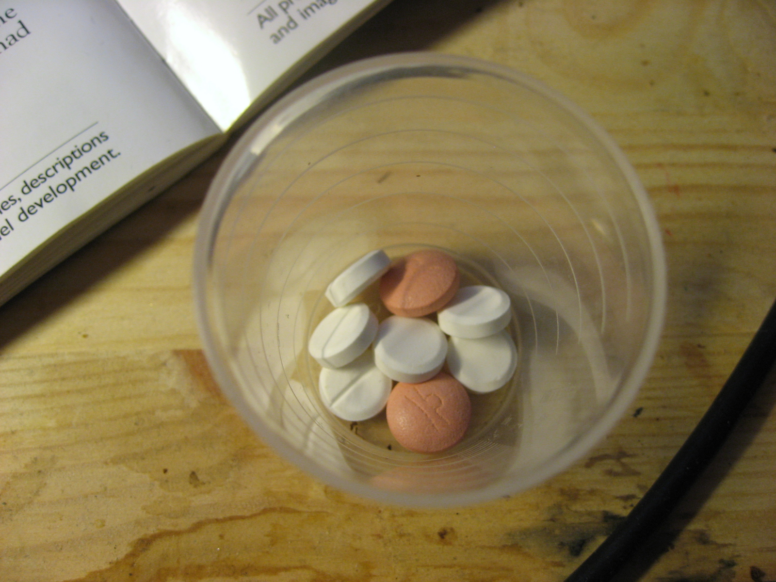 Tenox 20mg ja Tramal Retard 200mg tabletteja